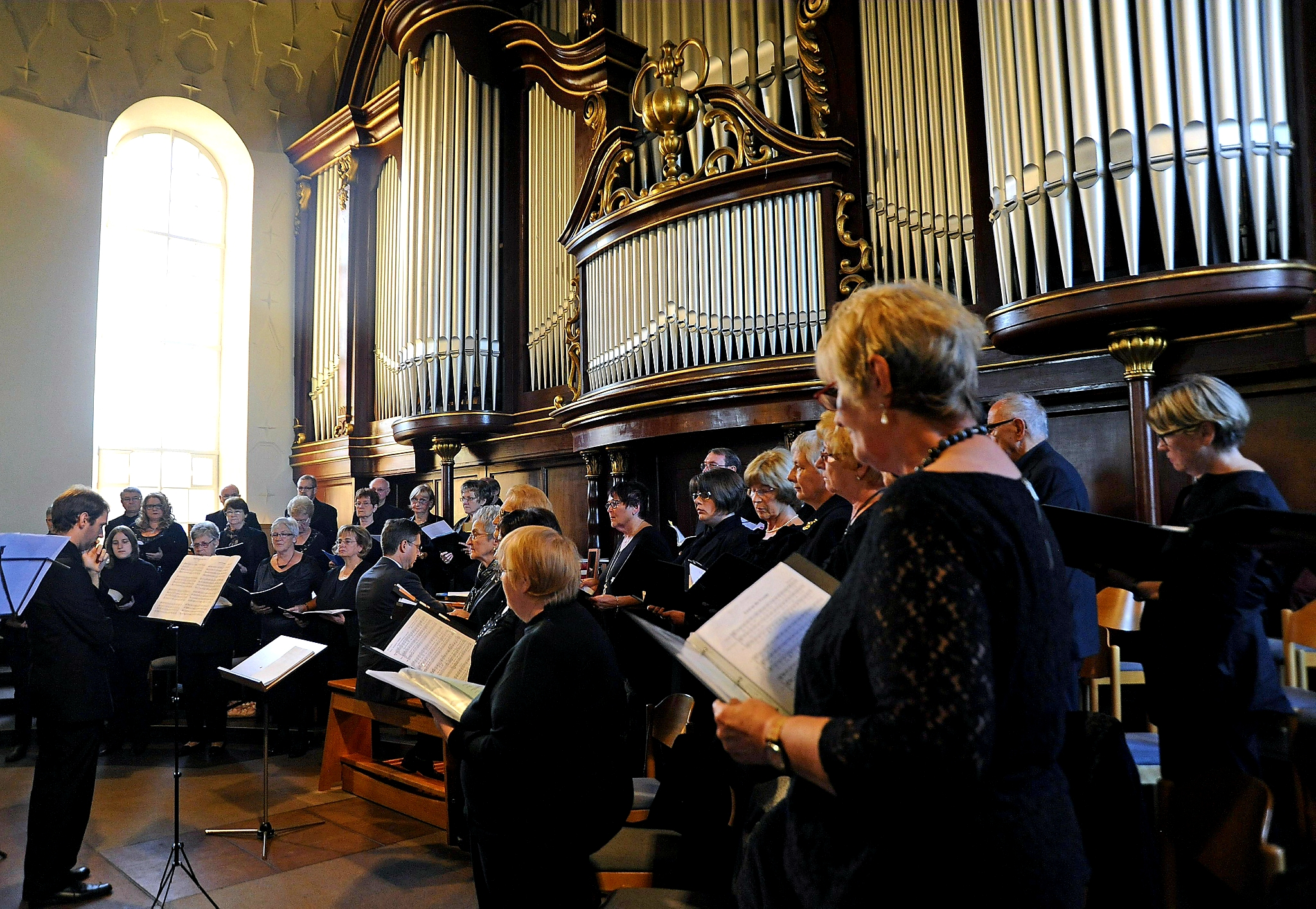 Concert du 27 septembre 2014 du Choeur du Festival d'orgues Forbach-Völklingen à la Versöhnungskirche de Völklingen